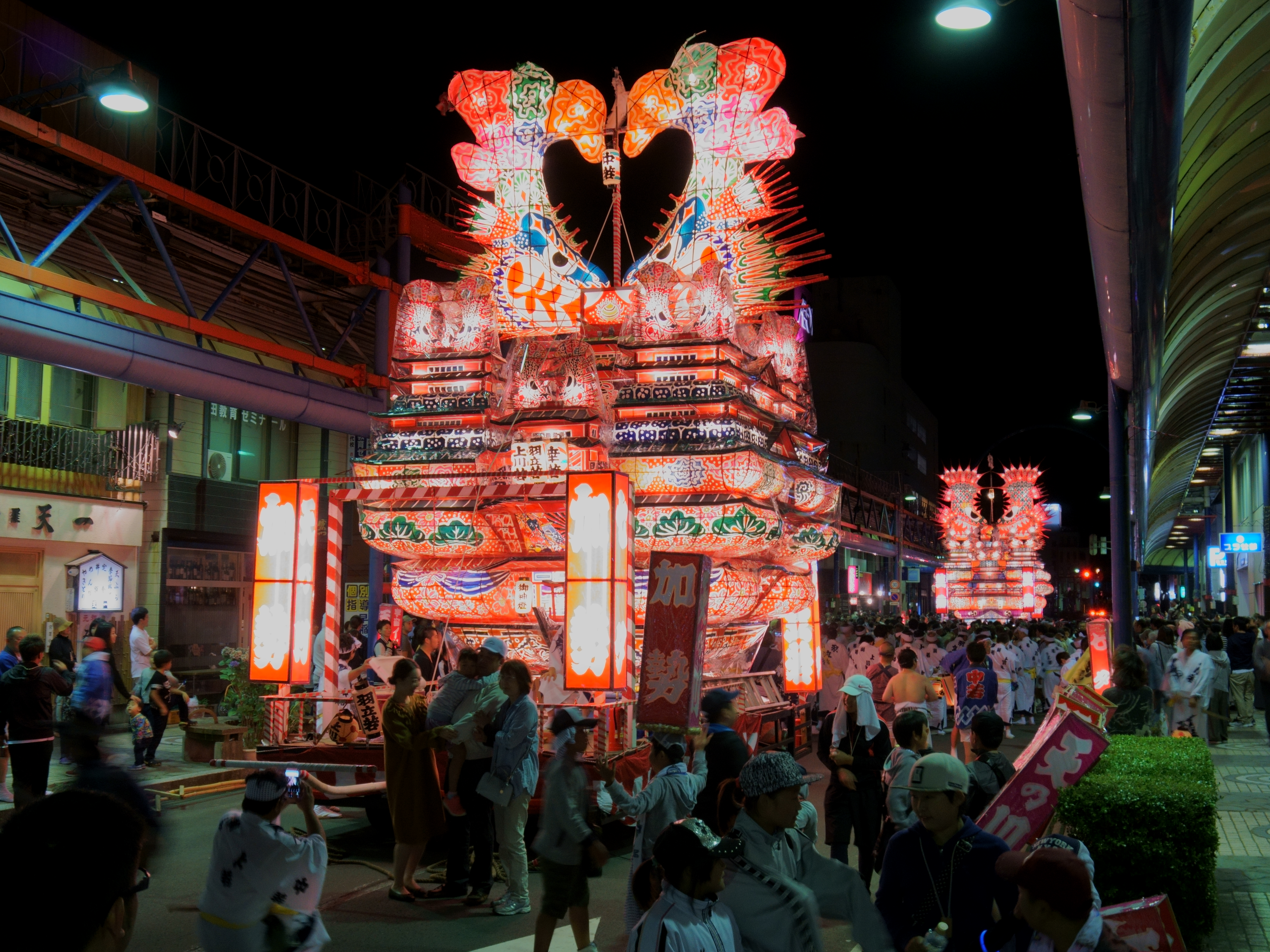 秋田県能代市の中心街で行われる伝統行事「能代役七夕」。2017年の運行は萬町組（あらまちぐみ）の担当で、萬若の燈籠と加勢丁の燈籠の2基が市内を練り歩いた。柳町商店街にて